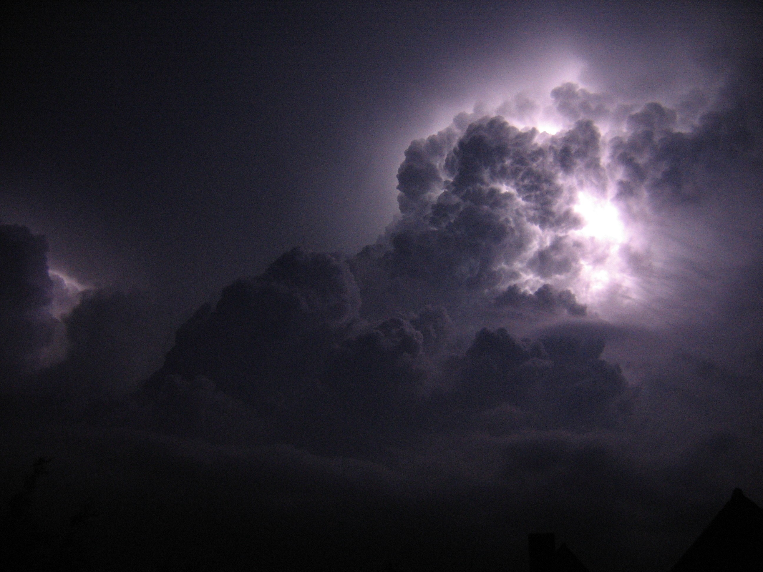 Orage vu de nuit - Photo de Dorothée Taverne